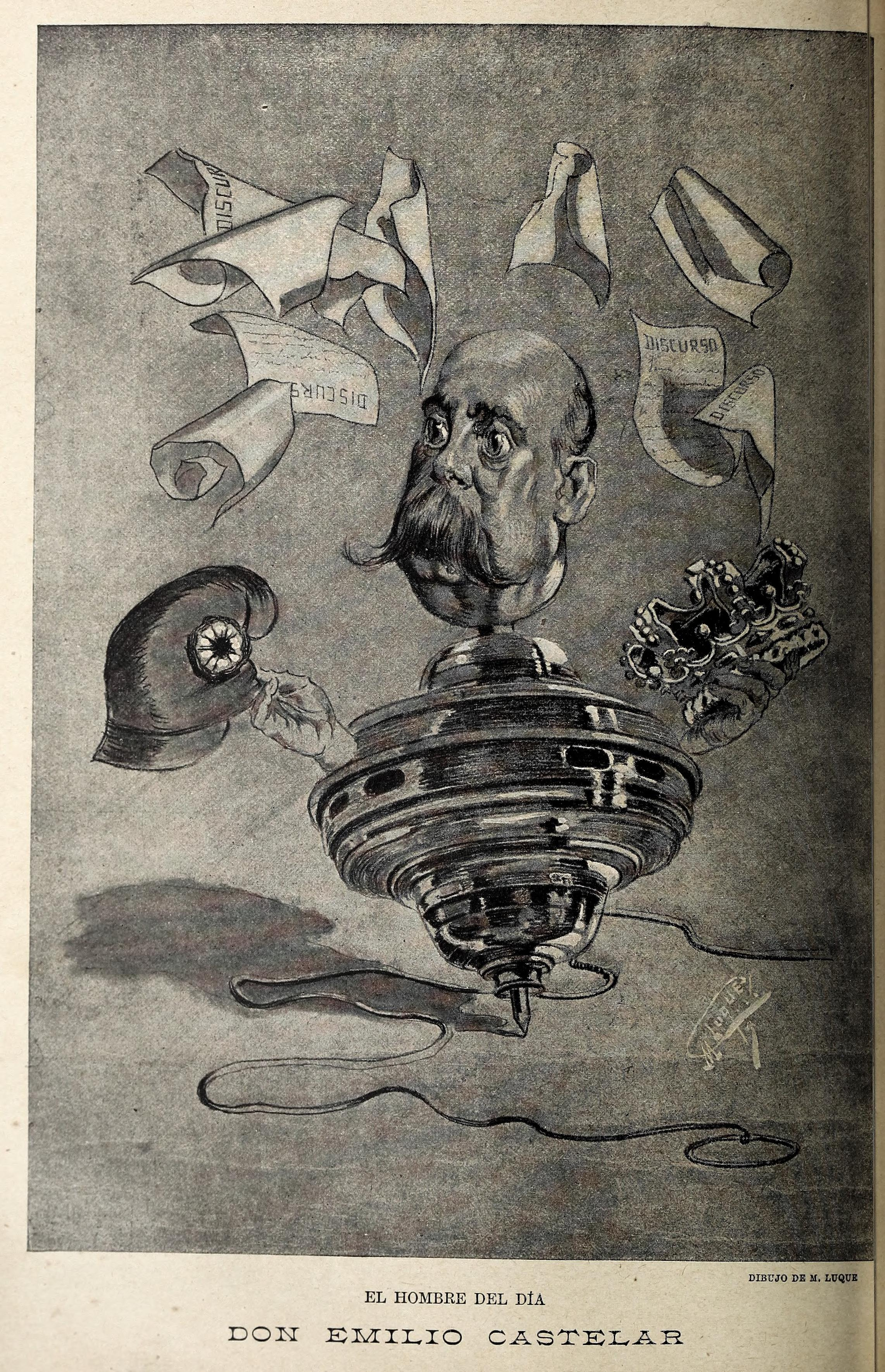 Don Emilio Castelar, de M. Luque.